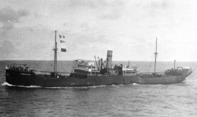 Foto do navio a vapor Olinda, afundado em 1942. A foto provavelmente é anterior a 1934 (ano em que foi comprado pelo Brasil), uma vez que ainda ostentava o nome Kennemerland